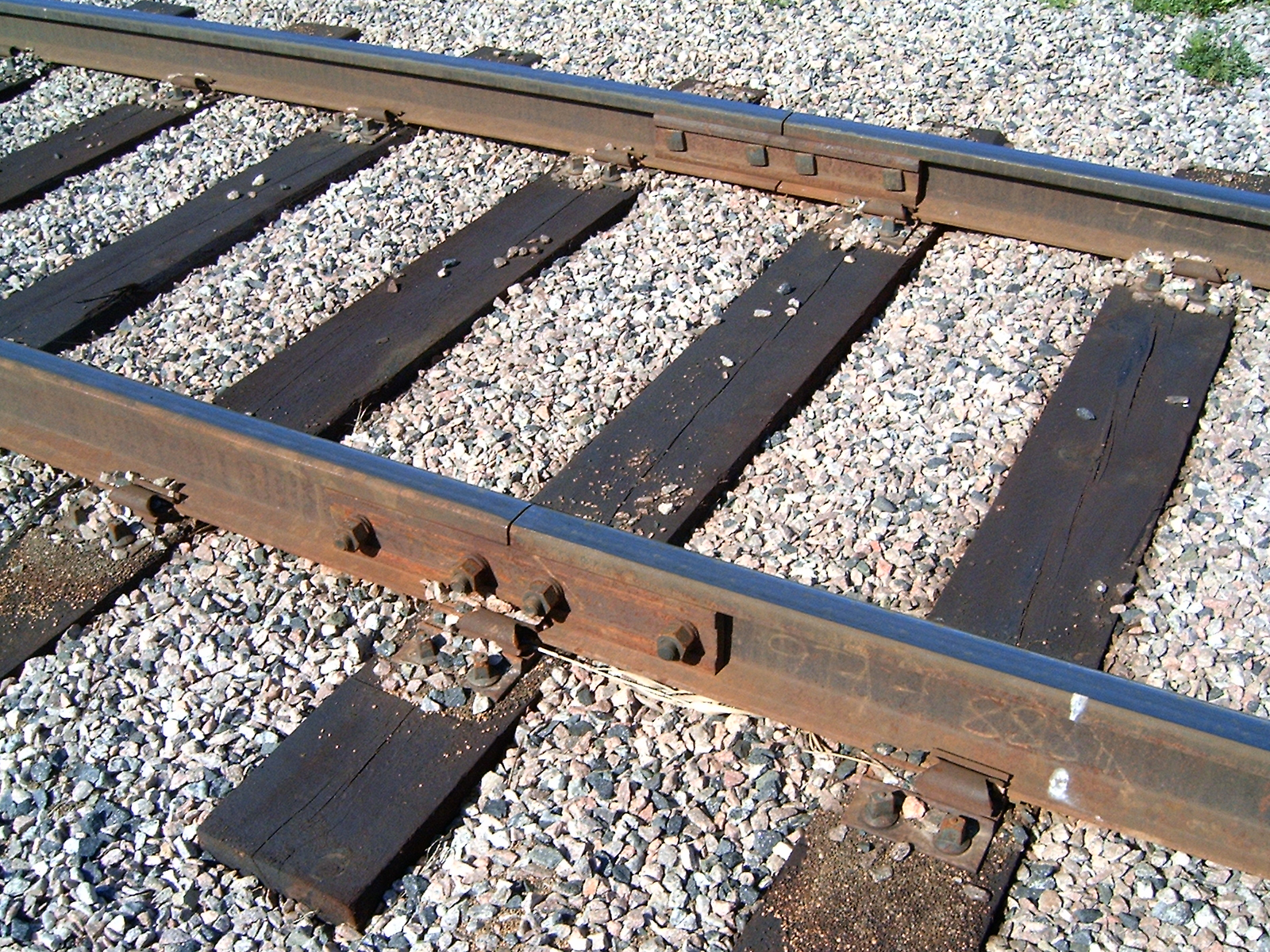 Träsliper med heybackfästning och skarv.